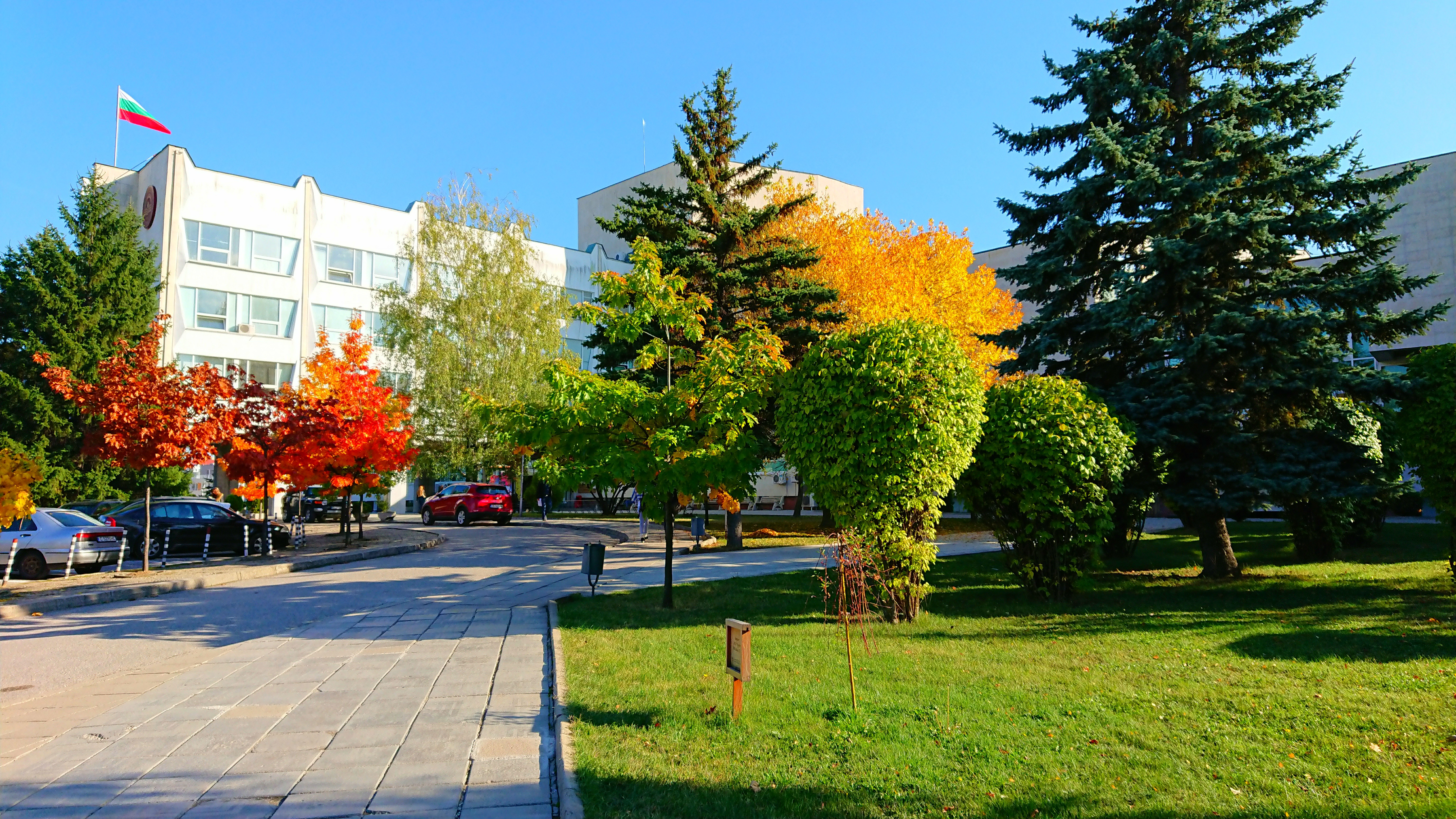 Пред главния вход на УНСС